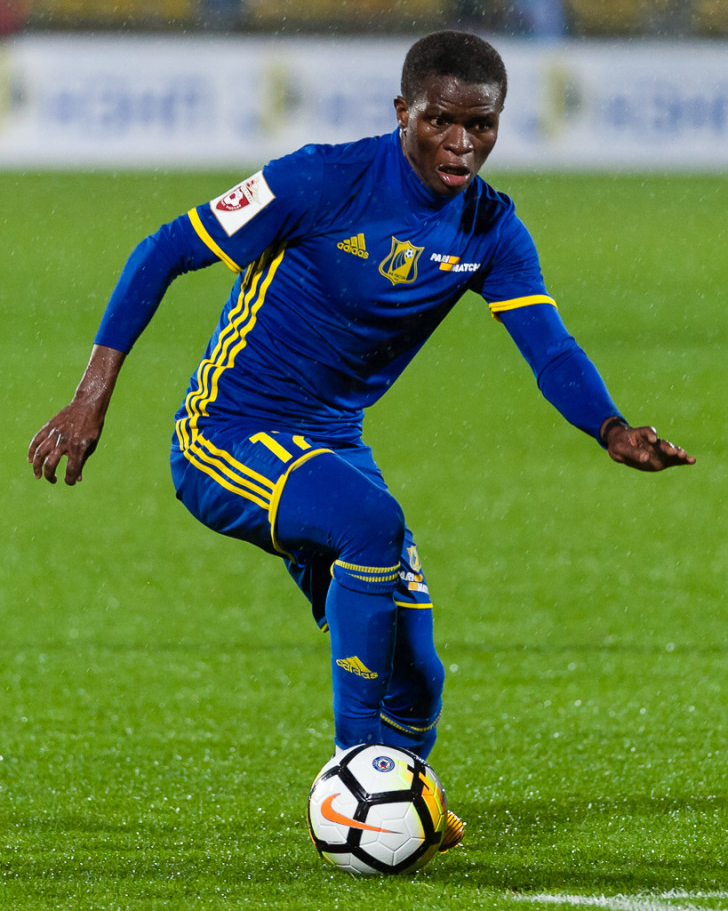 «Ростов» – «Рубин»